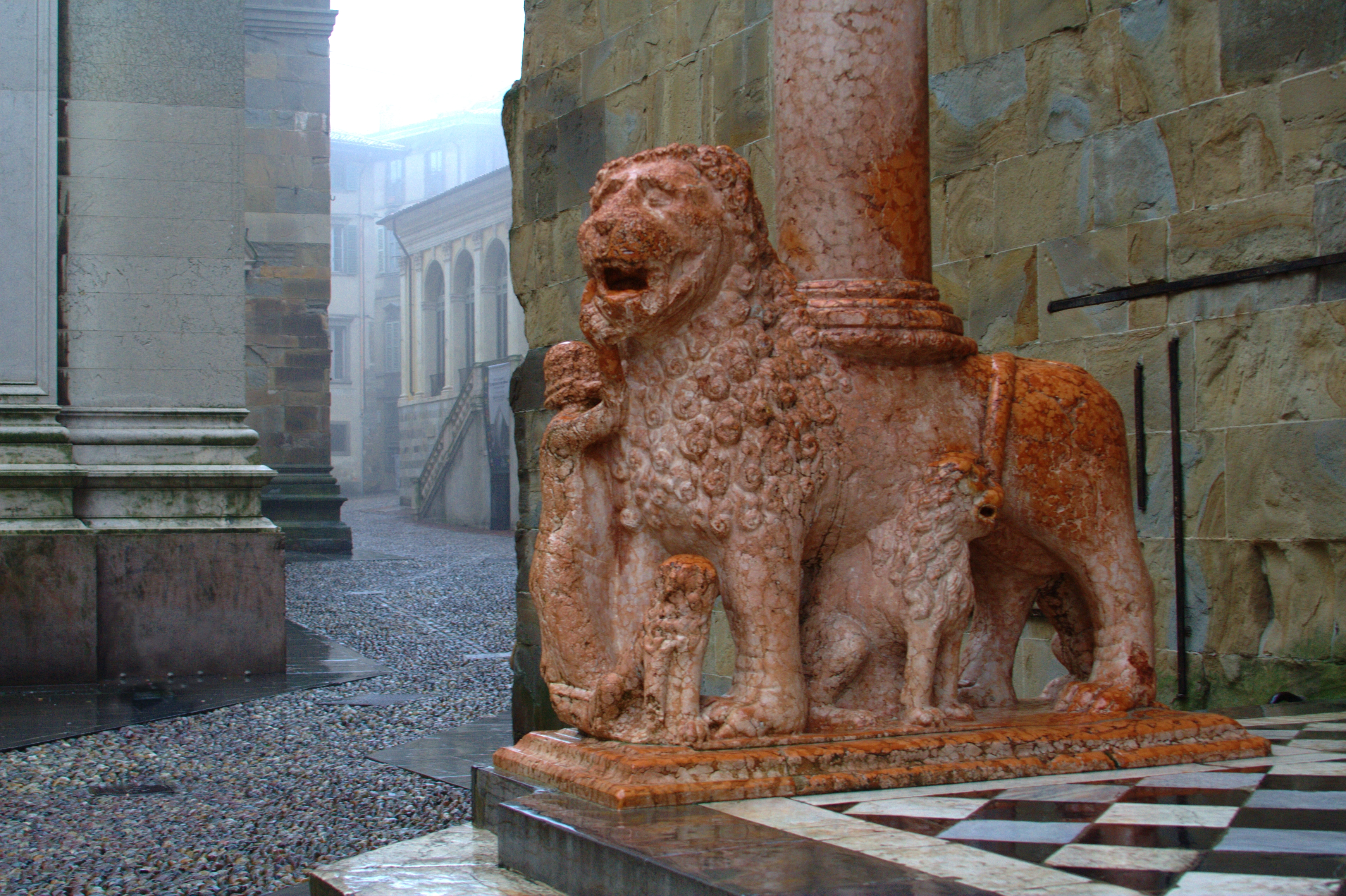 Bergamo, Basilica Santa Maria Maggiore, lion under the Protiro of Giovanni da Campione